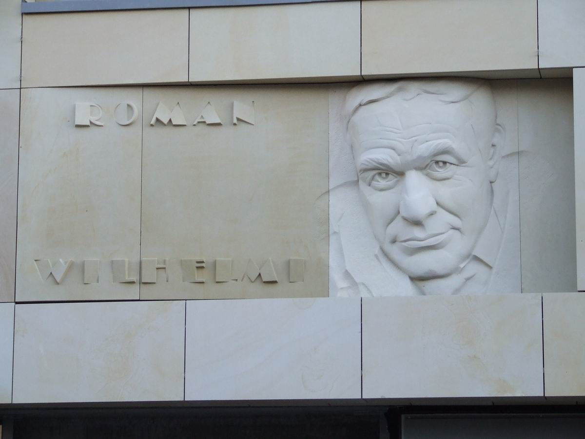 Roman Wilhelmi 1936-1991, płaskorzeźba na ścianie Kina Praha w Warszawie